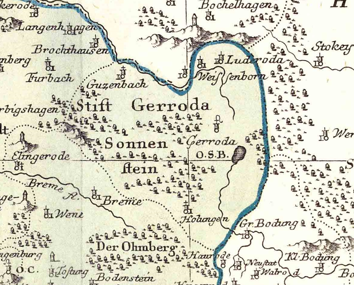 Ausschnitt aus der historischen Karte "Tractus Eichsfeldiae": das Kurmainzische Stift Gerode